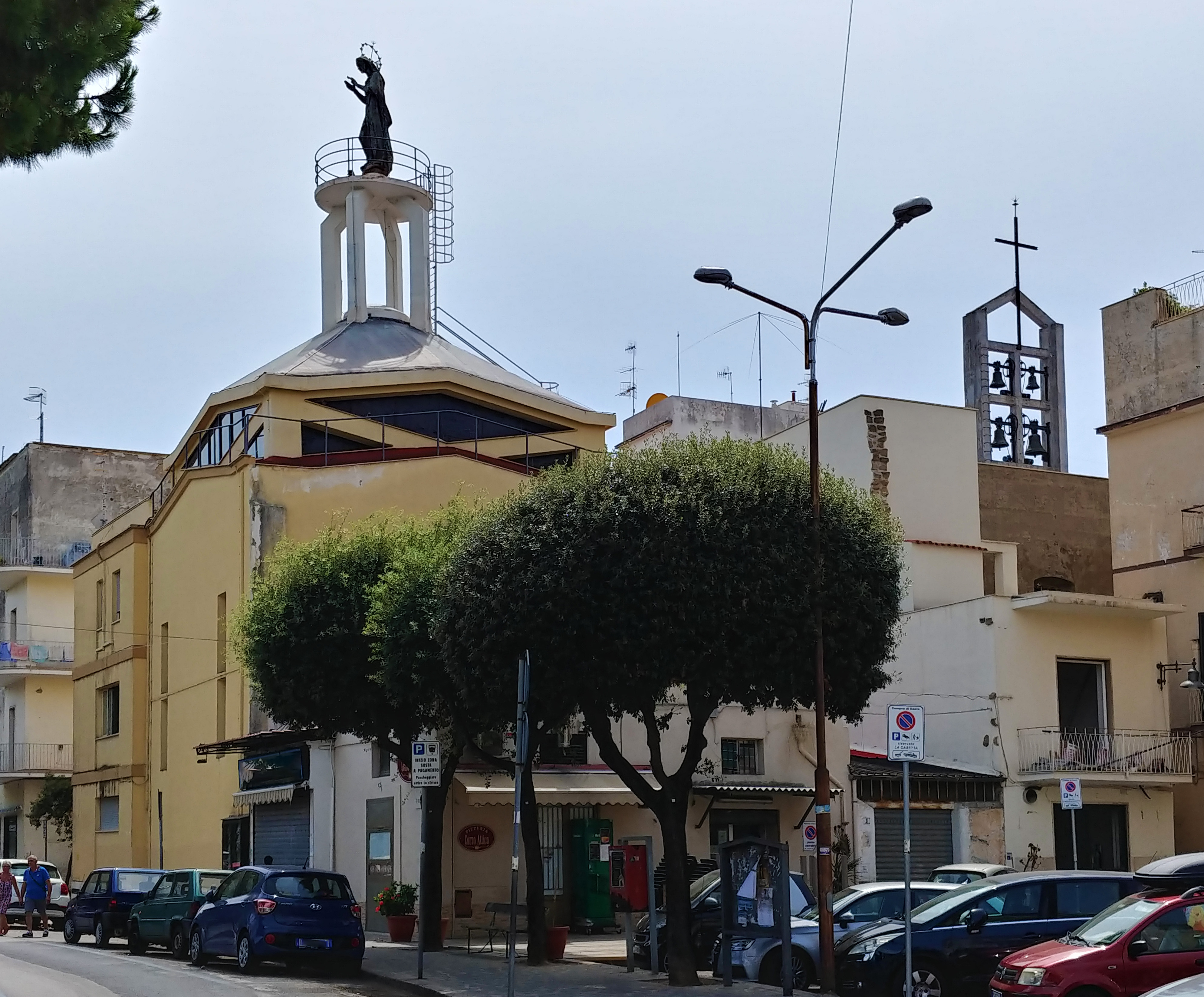 Veduta esterna con i moderni abside e campanile.